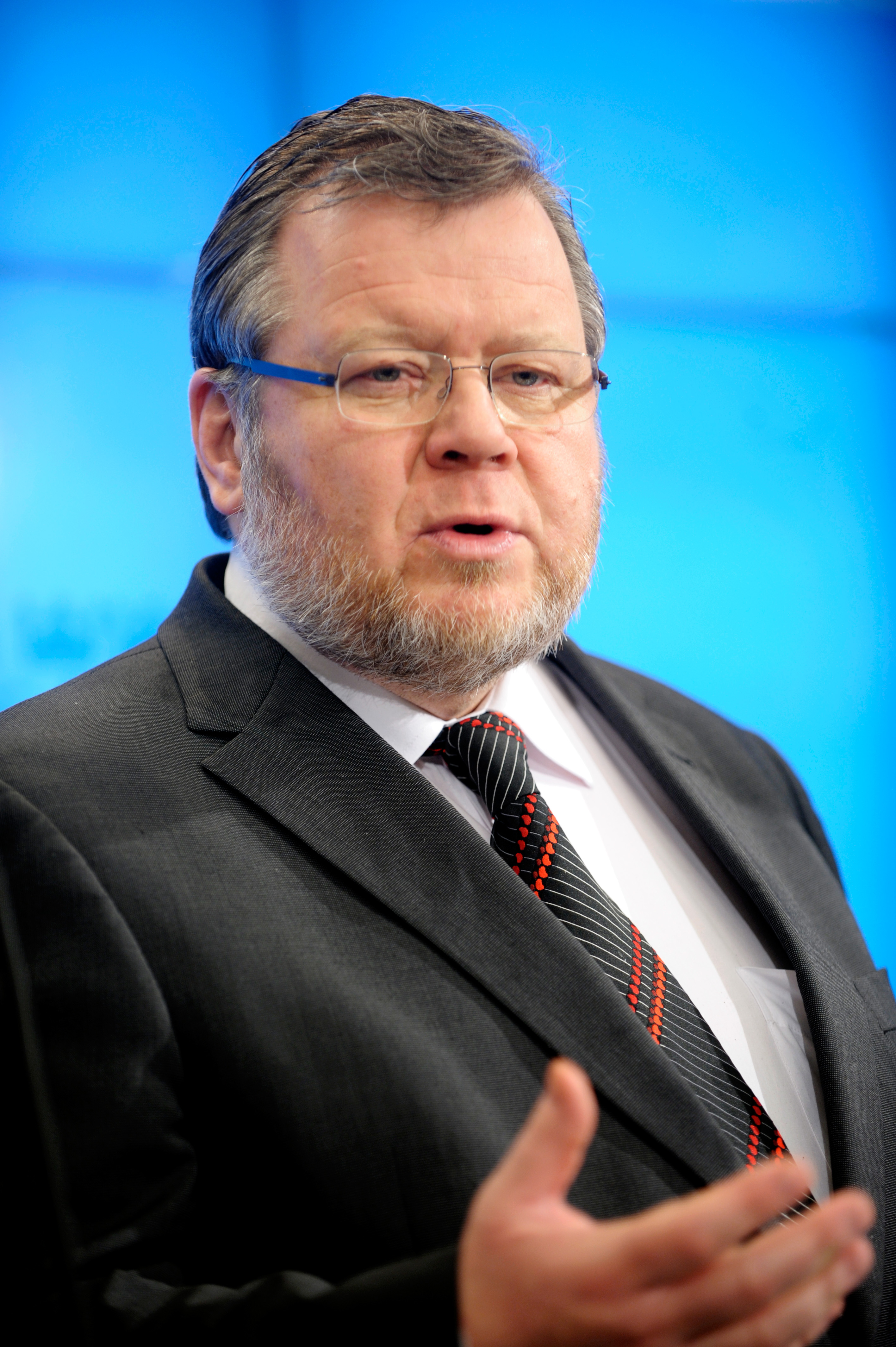 Össur Skarphéðinsson, utrikesminister Island. Nordiska rådets session 2009.